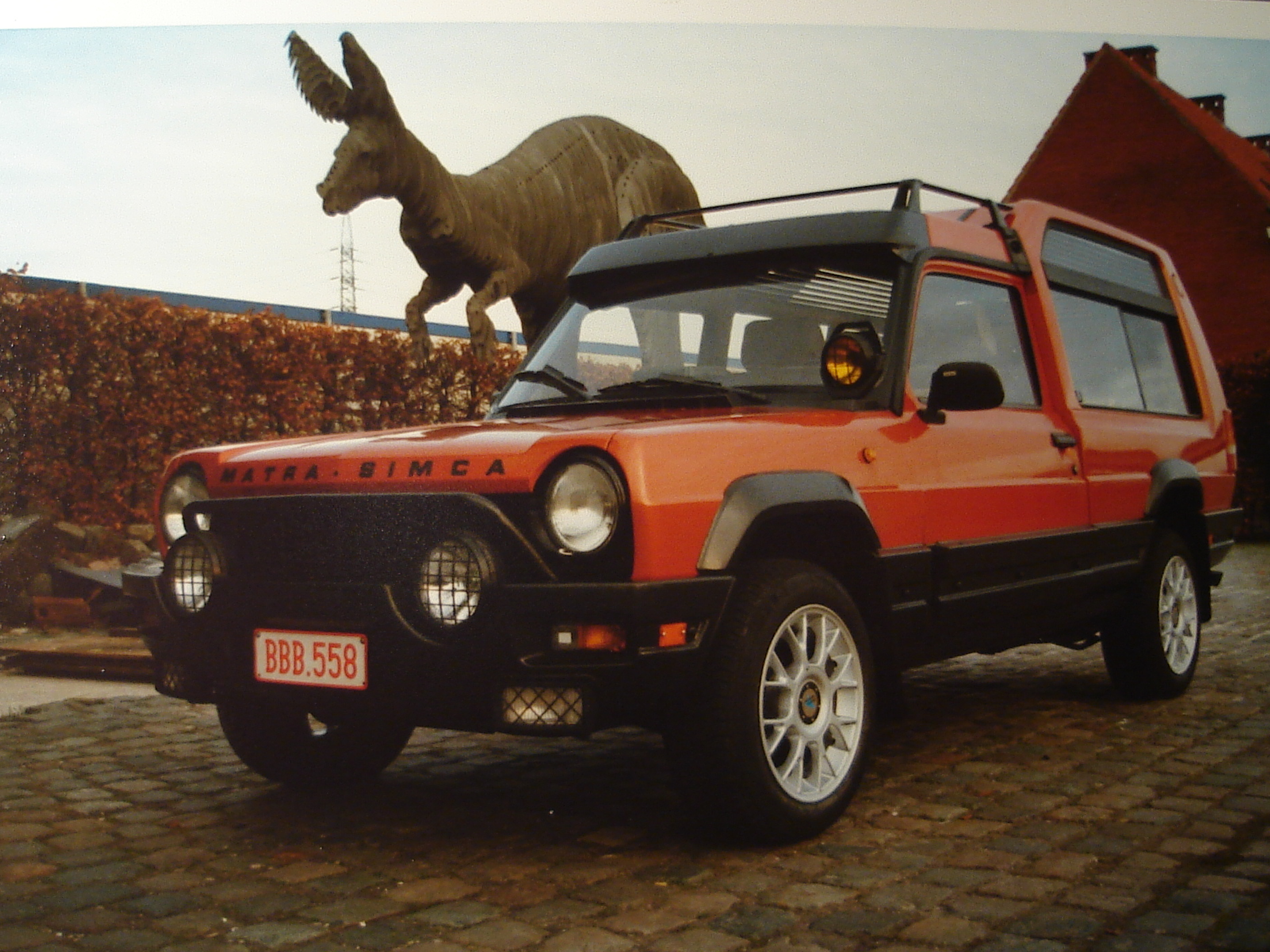 matra rancho 1978